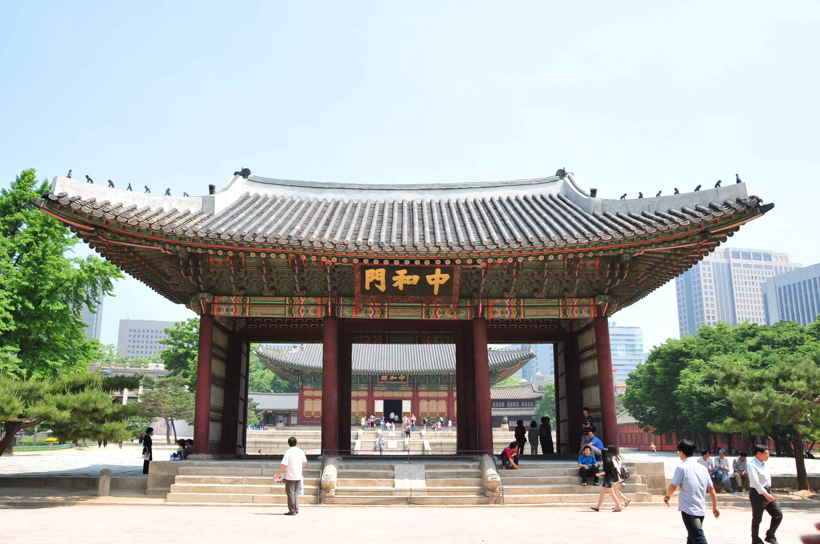 Own work 덕수궁 중화문